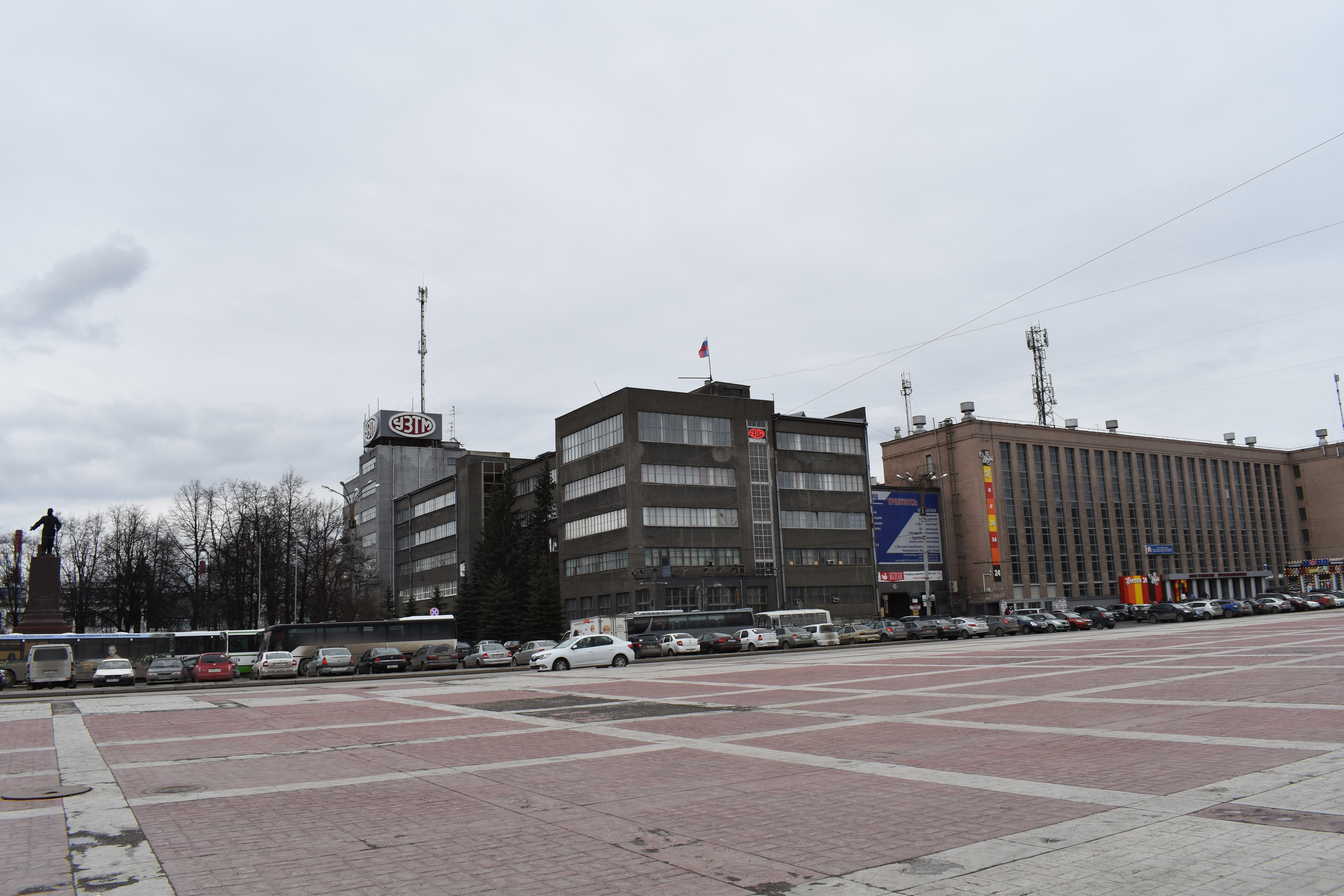 Площадь 1-й Пятилетки, вид со стороны проспекта Орджоникидзе